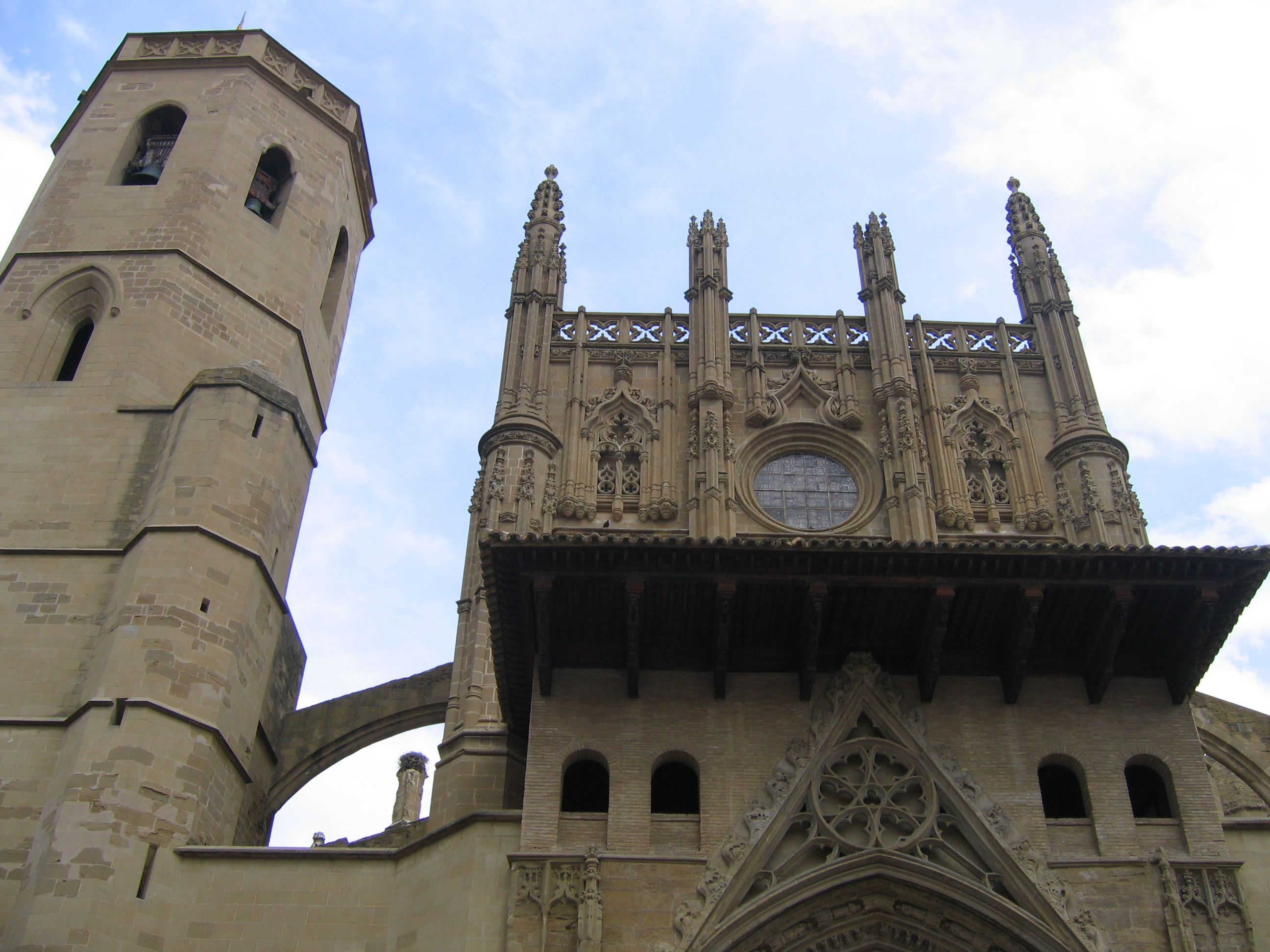 Description: Cathédrale de HuescaAragon, Espagne Source: Hugo Soria Licence: GFDL